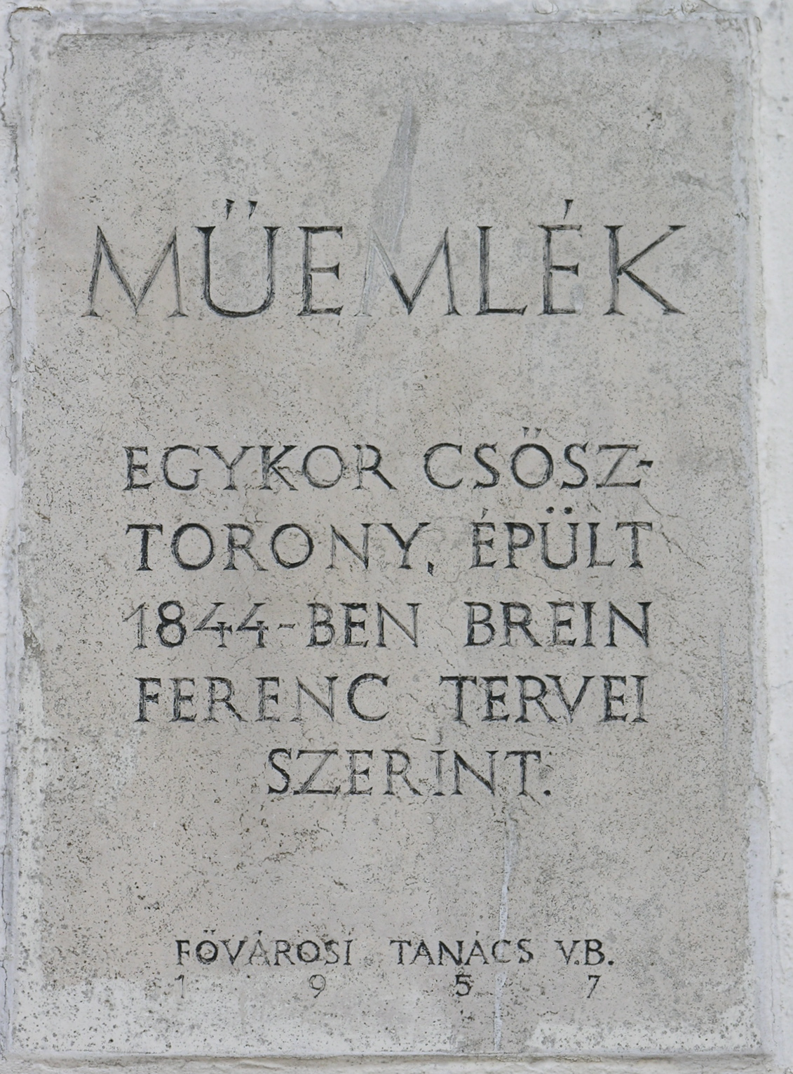 a kőbányai csősztorony emléktáblája, Budapest, X., Gitár utca 1.